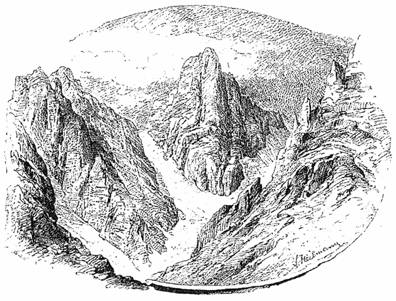 Der Ampezzaner Cristallkopf (Hochspitze der Cresta bianca) von der Forca (2114 m) gesehen, Zeichnung von Anton Paul Heilmann nach einer Photographie von P. W.